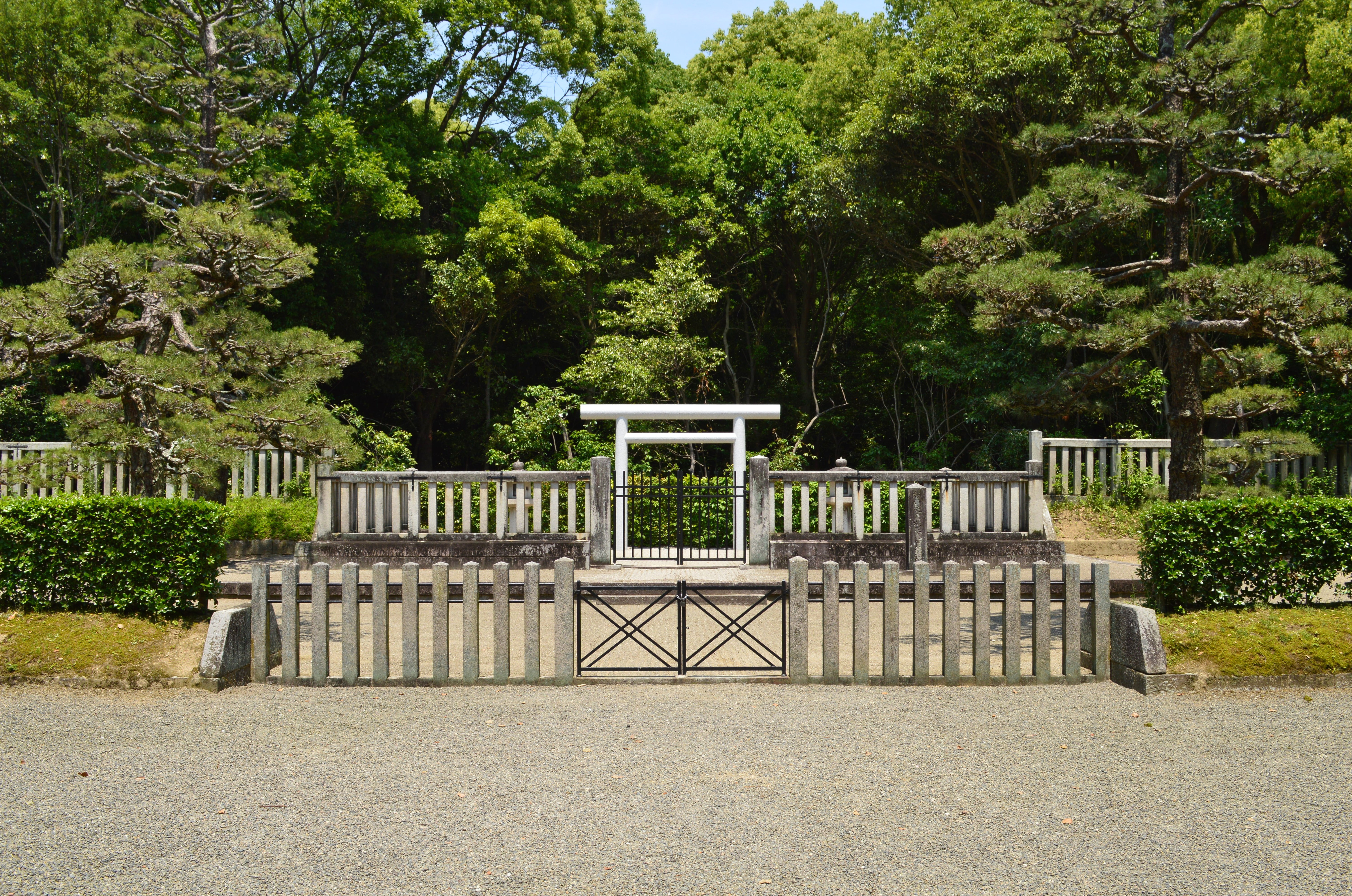 綏靖天皇桃花鳥田丘上陵 拝所